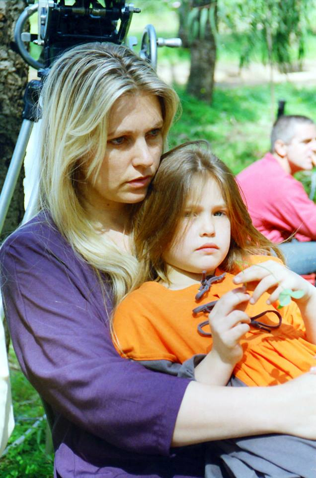 בר רפאלי ואמה ציפי לוין